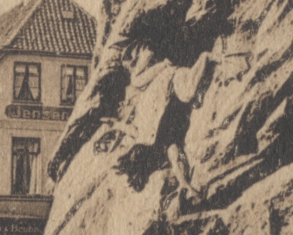 Foto Bismarckbrunnen von 1903 geerbt Frosch